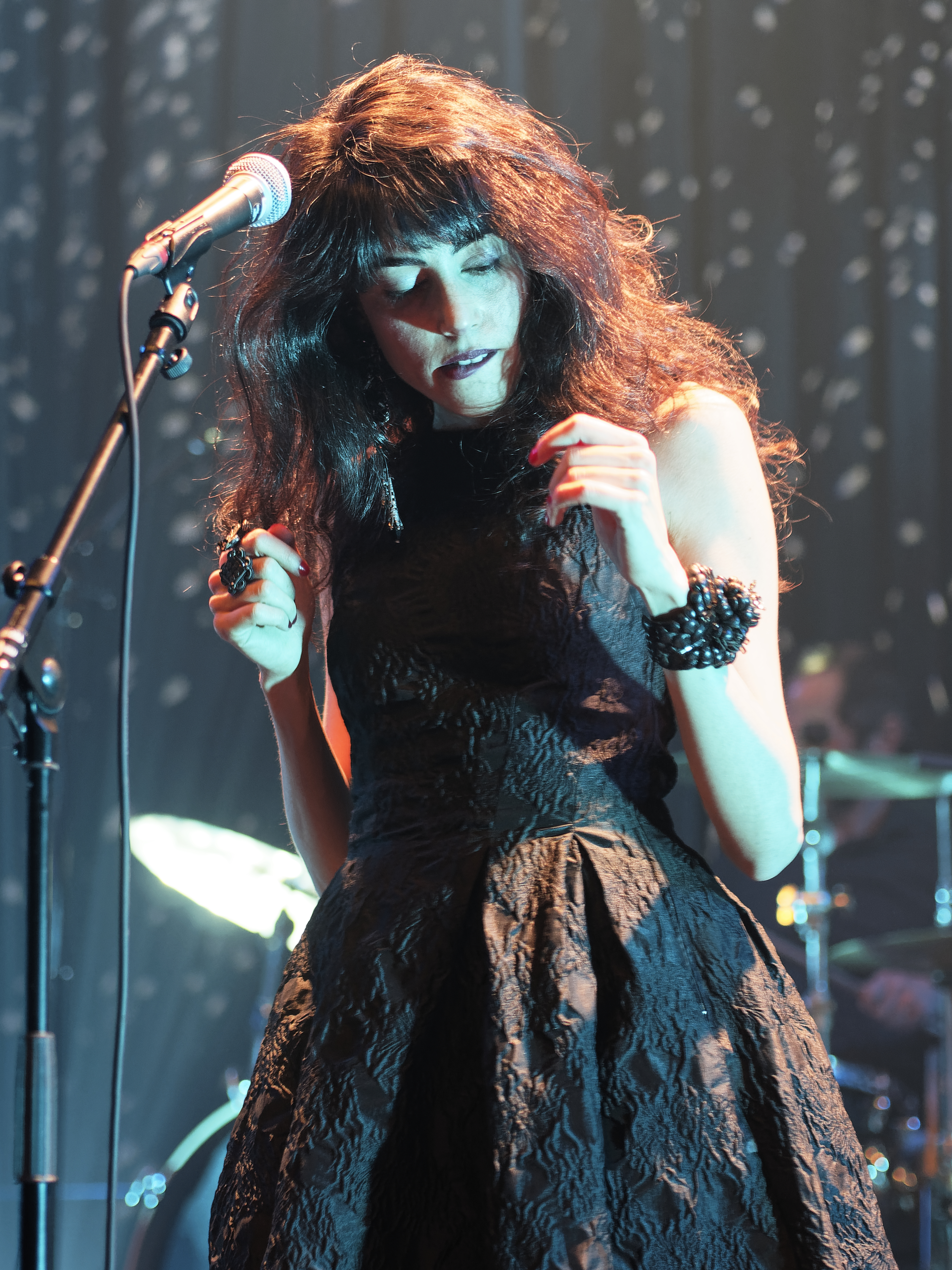 Concert van Oi Va Voi in TivoliVredenburg in Utrecht op 14 februari 2019, Zohara Niddam